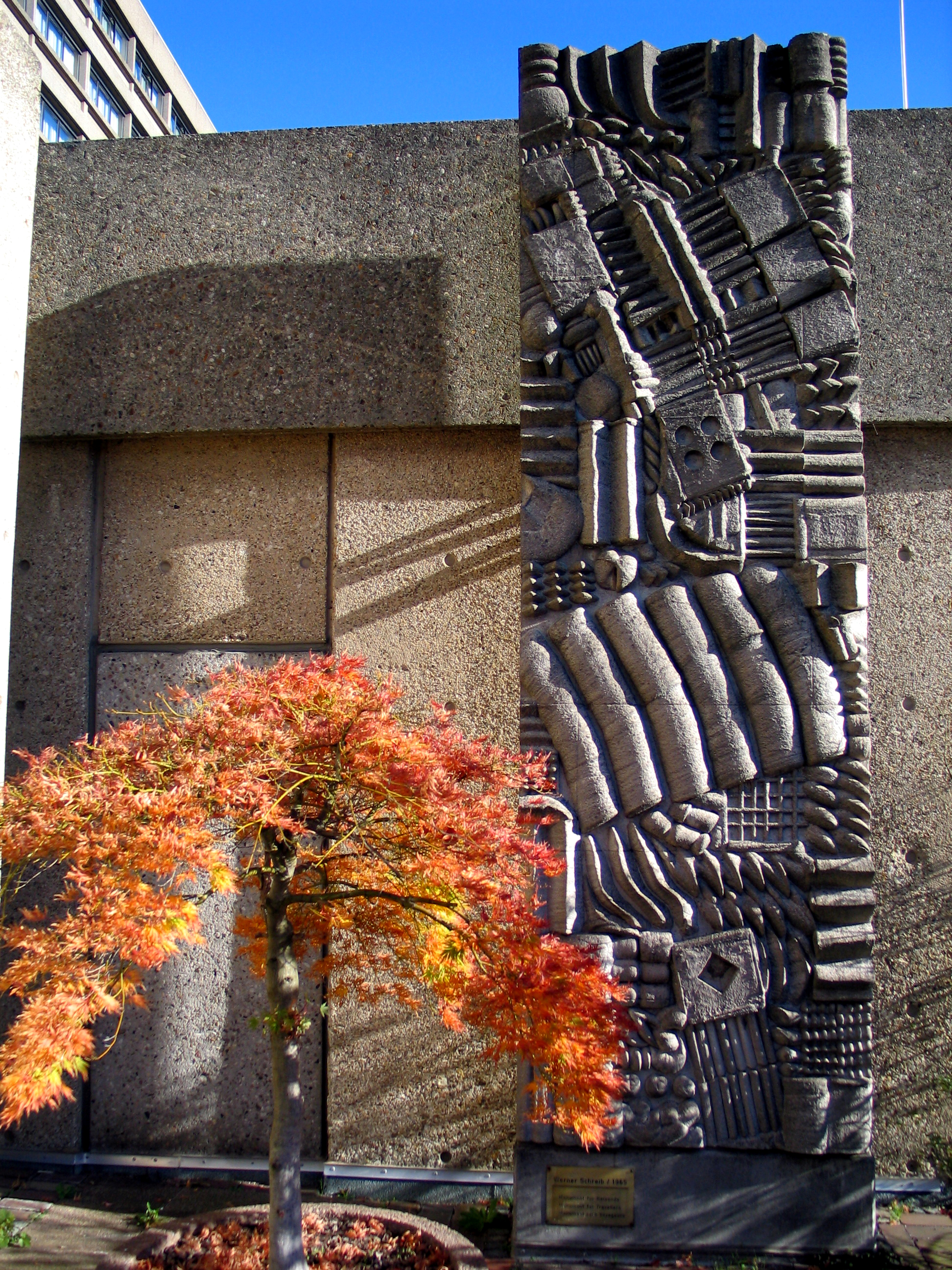 Frontalansicht der Skulptur Monument für Reisende, Monument for Travellers, Monument pour Voyageurs von Werner Schreib ...